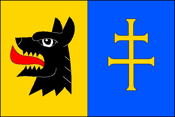 Vlajka, Sedliště, okres Svitavy